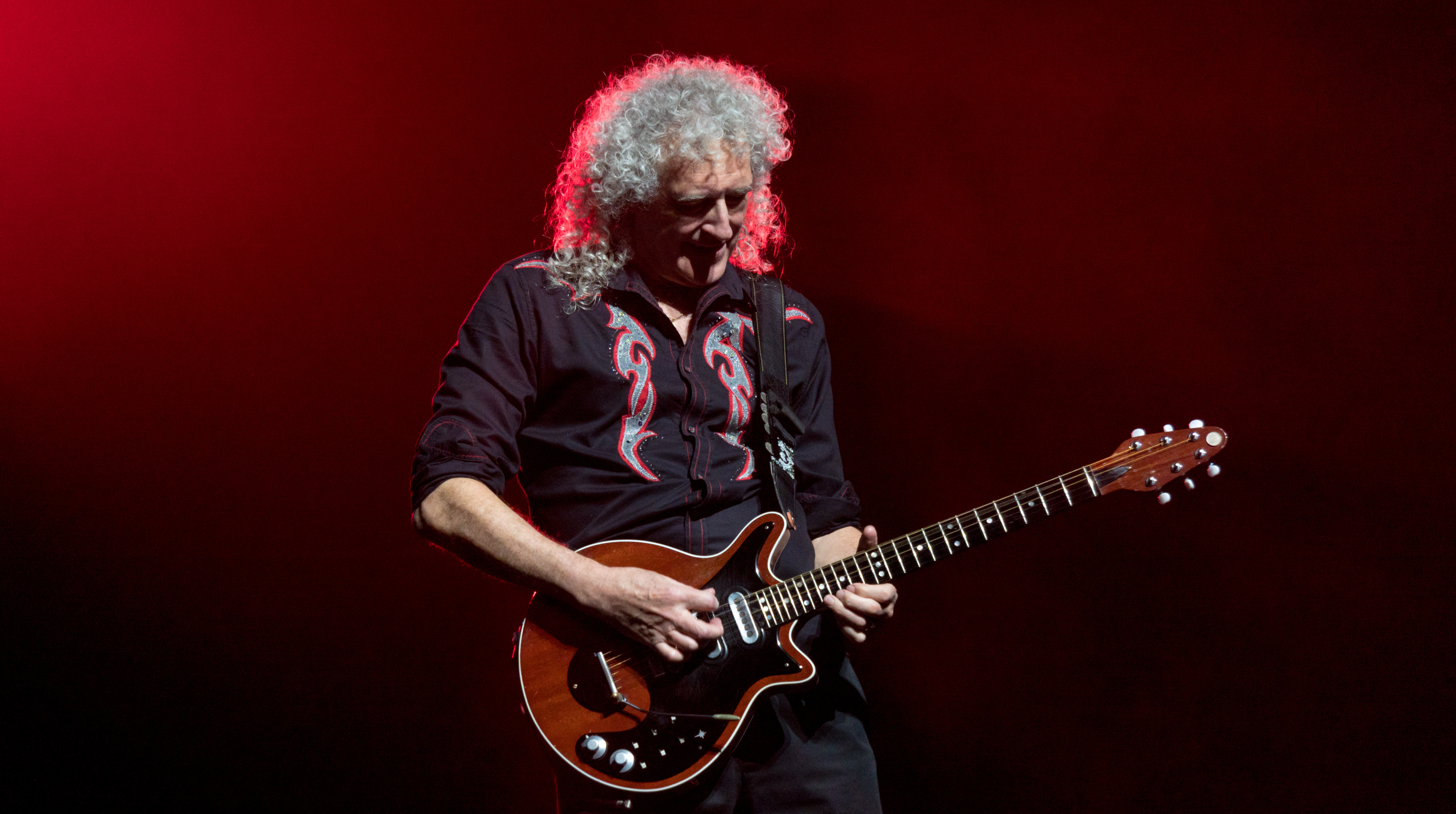 QueenO2121217-28